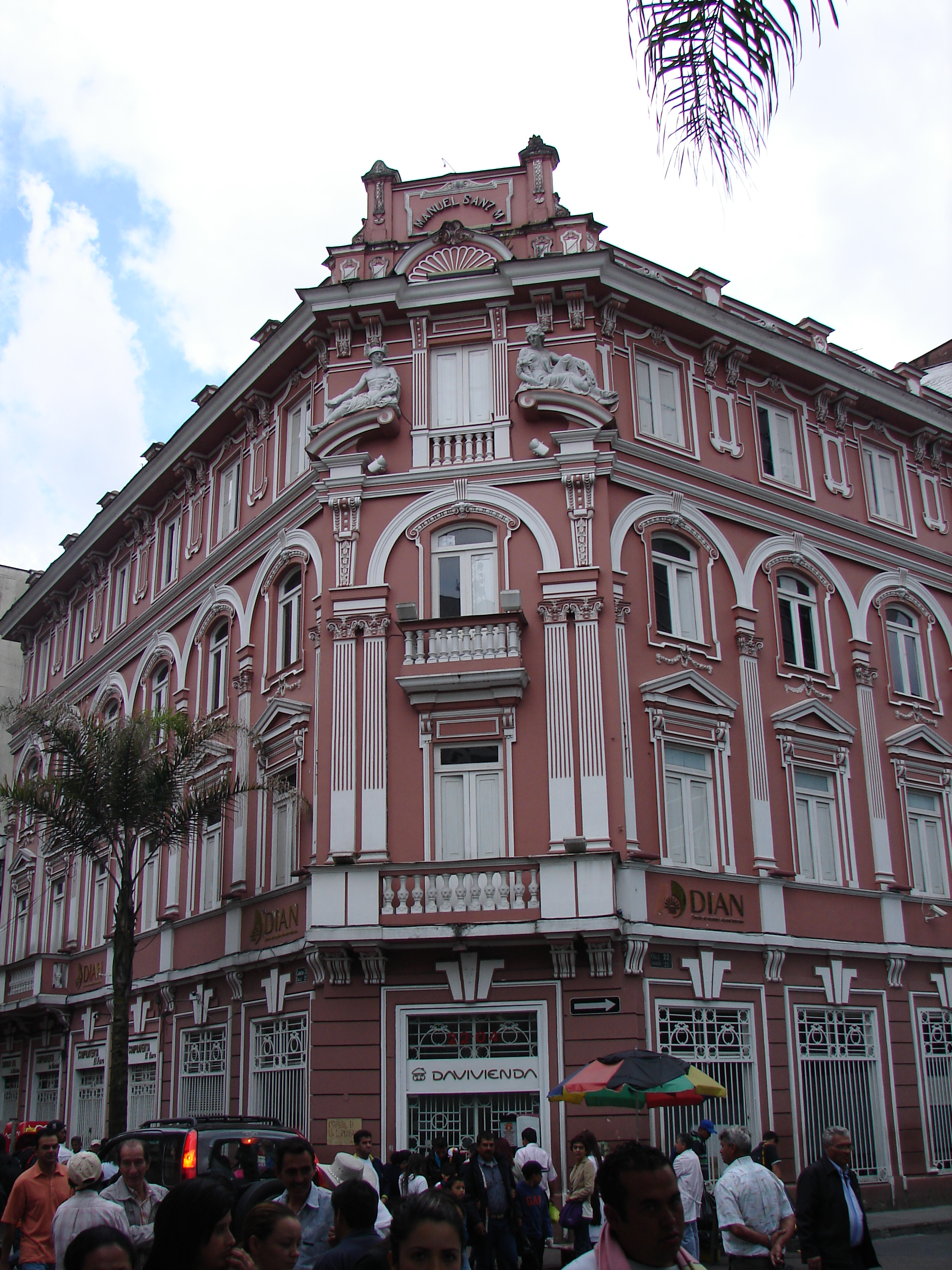 Antiguo Hotel Europa